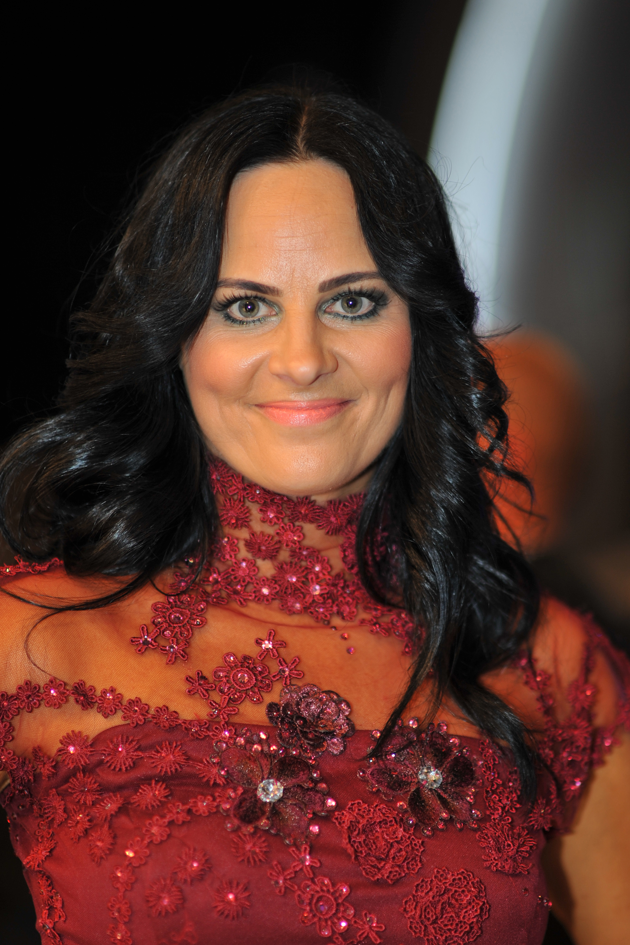 "Dancing Stars" am 24. Mai 2013: Nicole Burns-Hansen